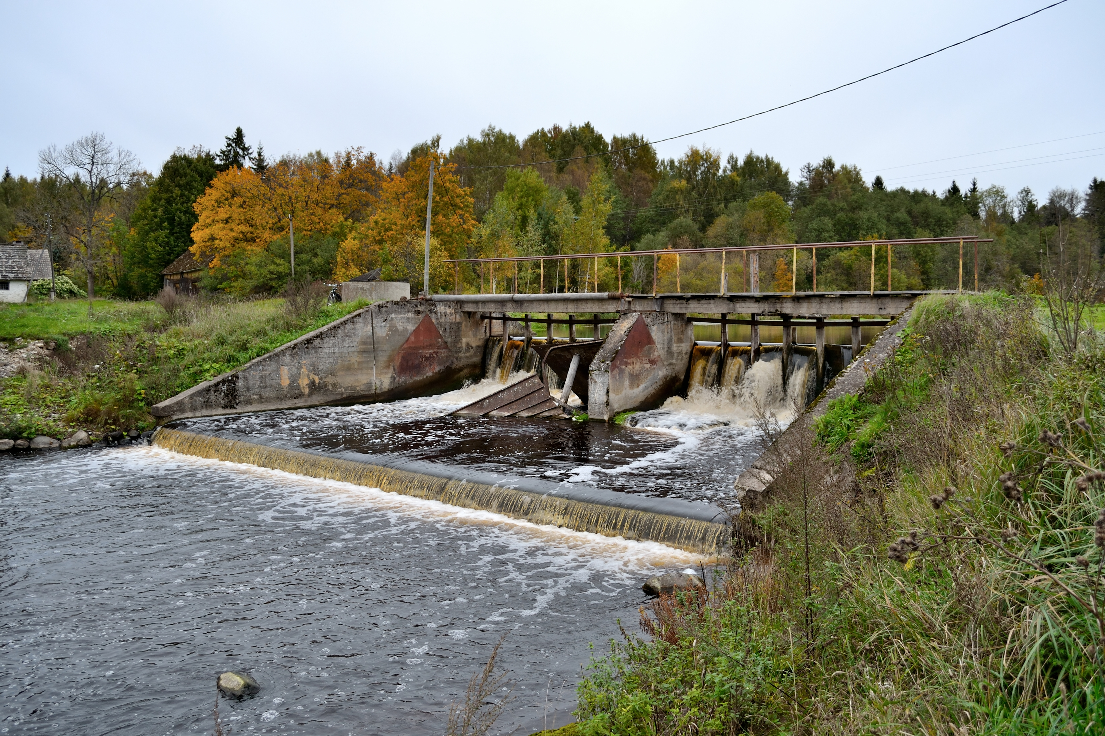 Kuusiku mõisa vesiveski tamm Vigala jõel